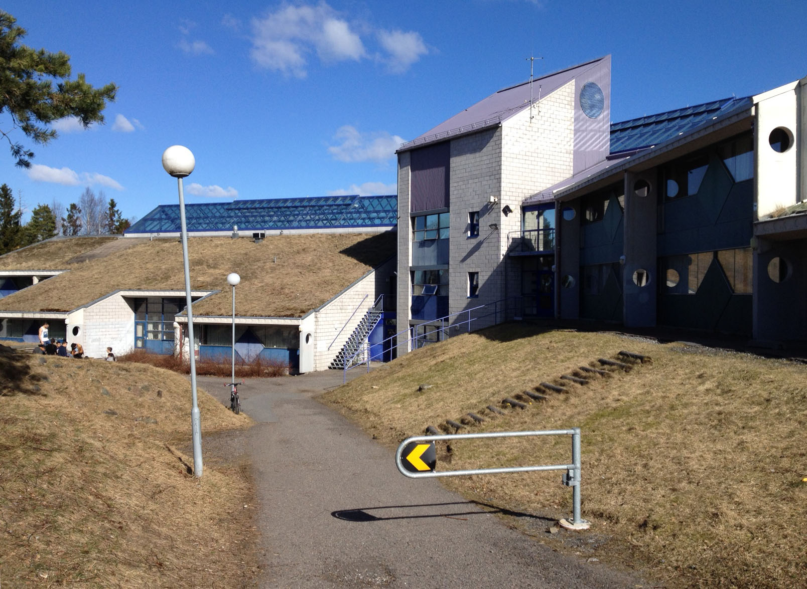 Lofsrud skole i Oslo